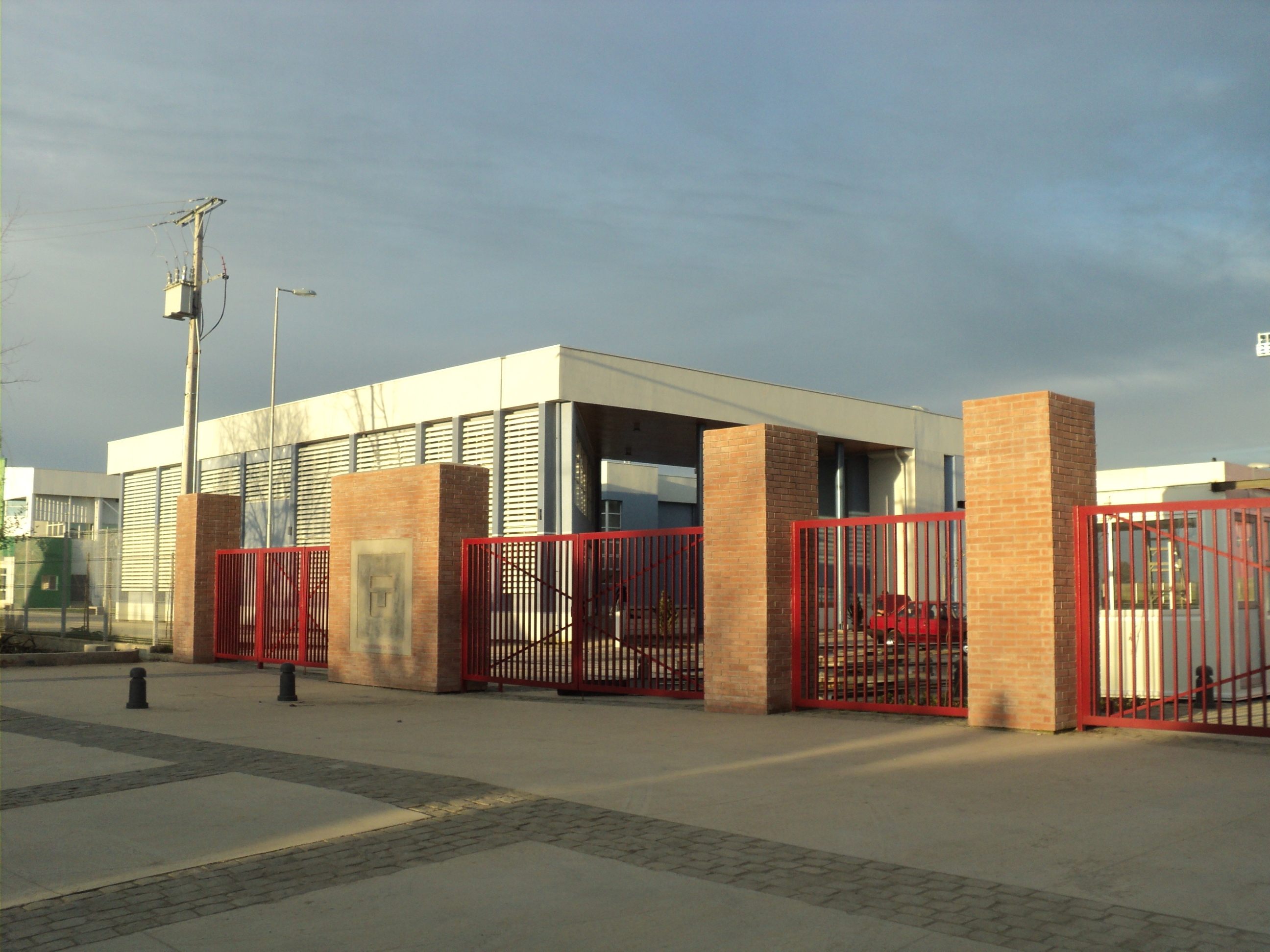 Entrada al campus Linares de la Universidad de Talca (a inaugurarse en el 2° semestre de 2016)